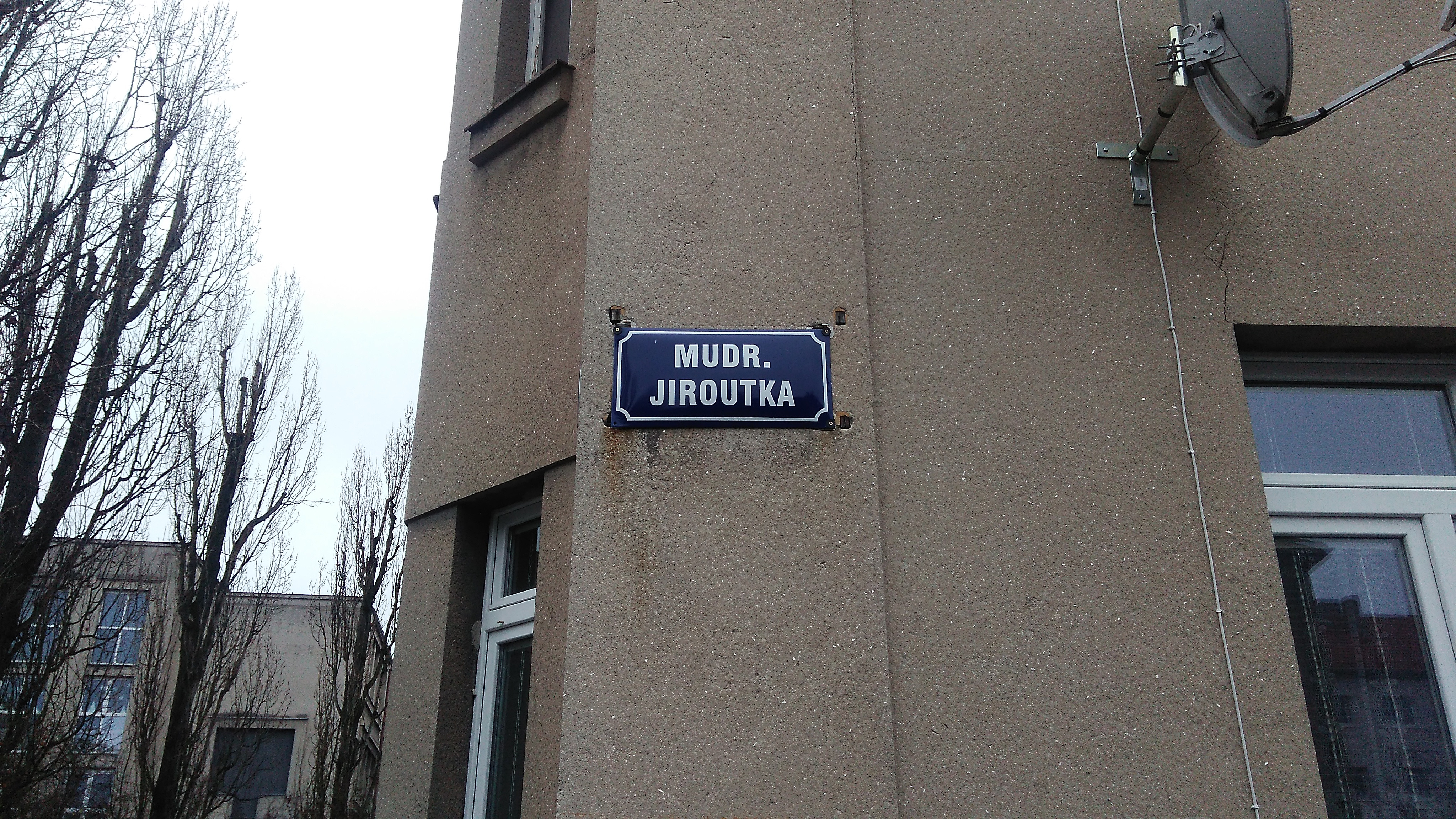 Kladno, ulice MUDr. Jiroutka, cedule na domě